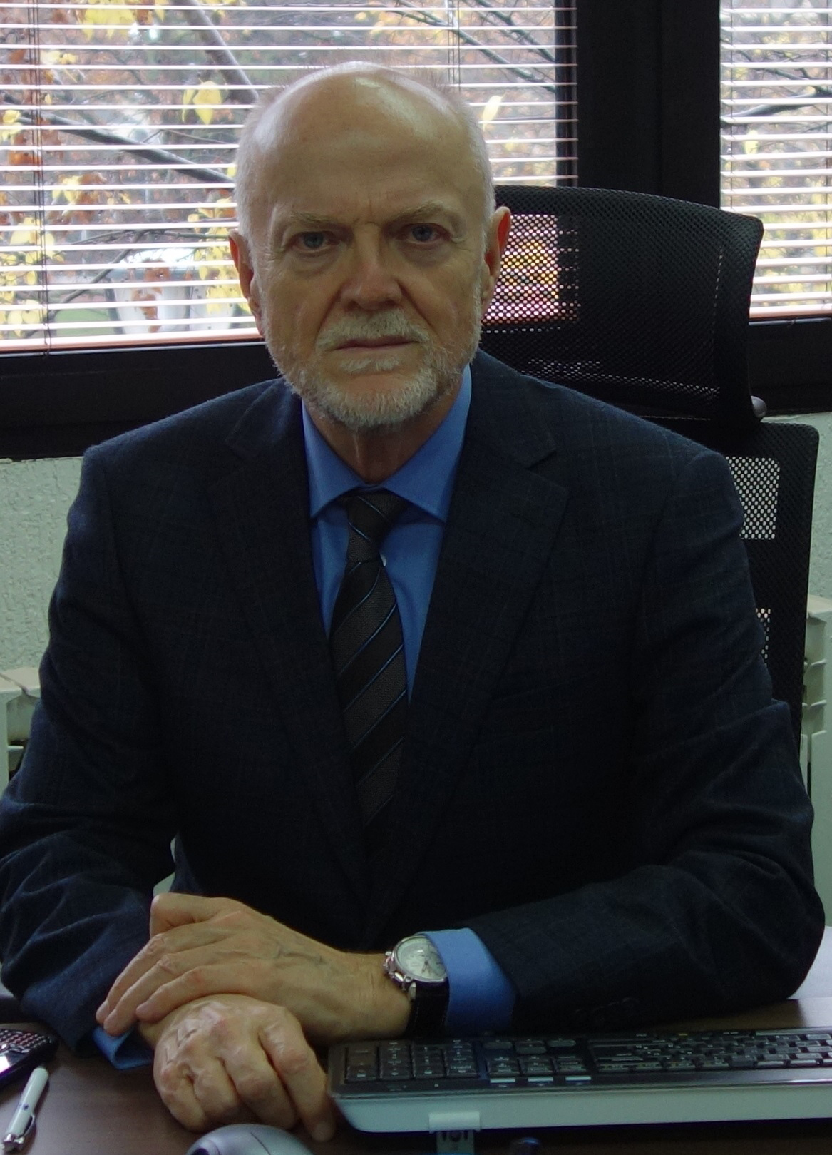 prof. dr Dragan Milkov